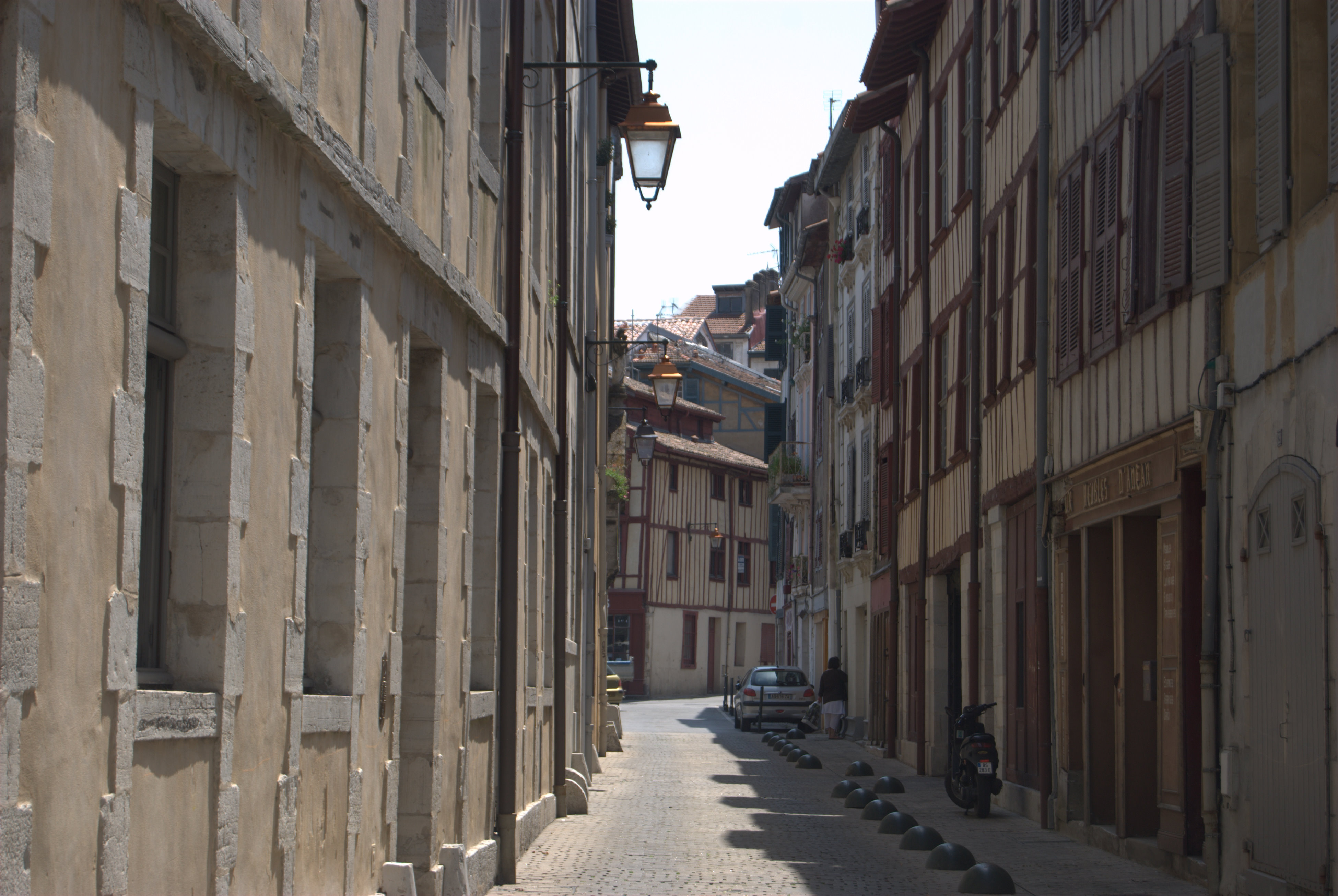 La rue Douer depuis la rue des Prébendés, Bayonne.